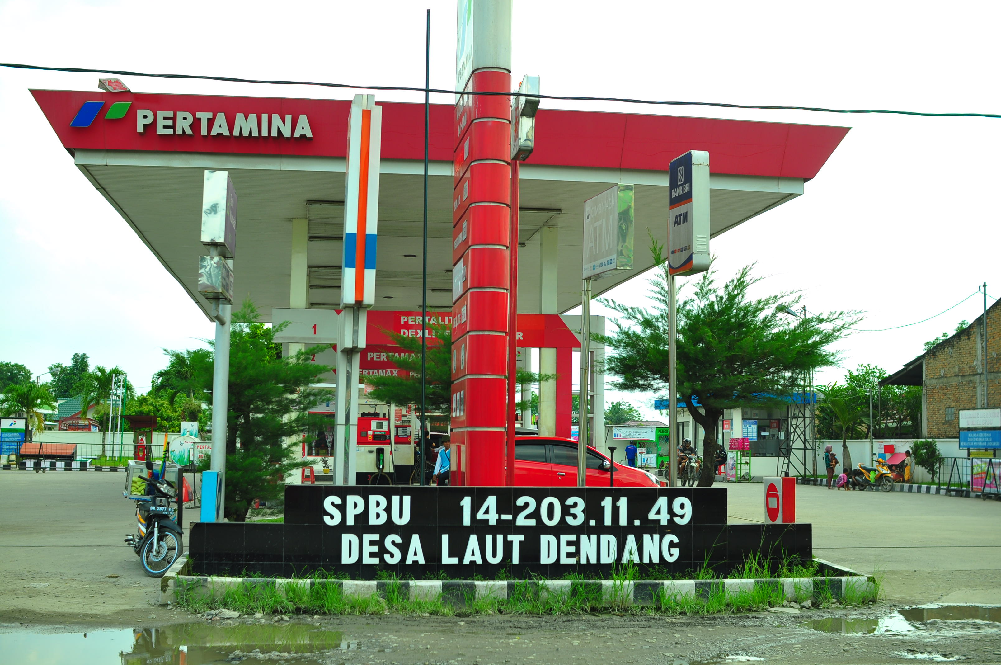 ATM centre